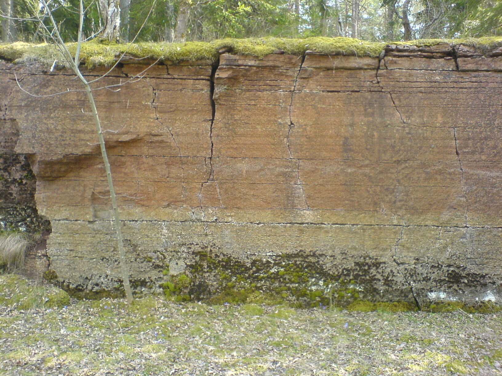 Kalksten på Kinnekulle. Övre delen av profilen utvecklar ett karstssystem.